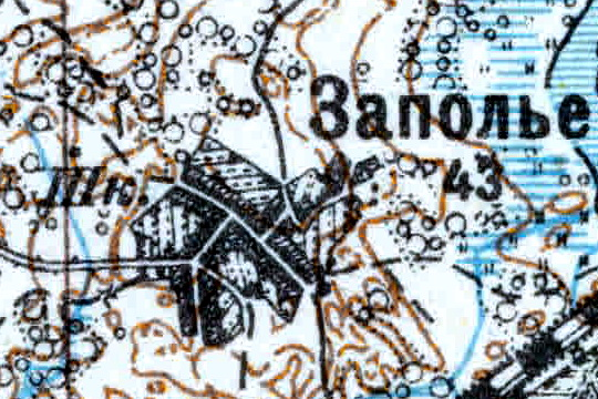 Топографическая карта Ленинградской области, квадрат VIc-28 (Луга), деревня Заполье